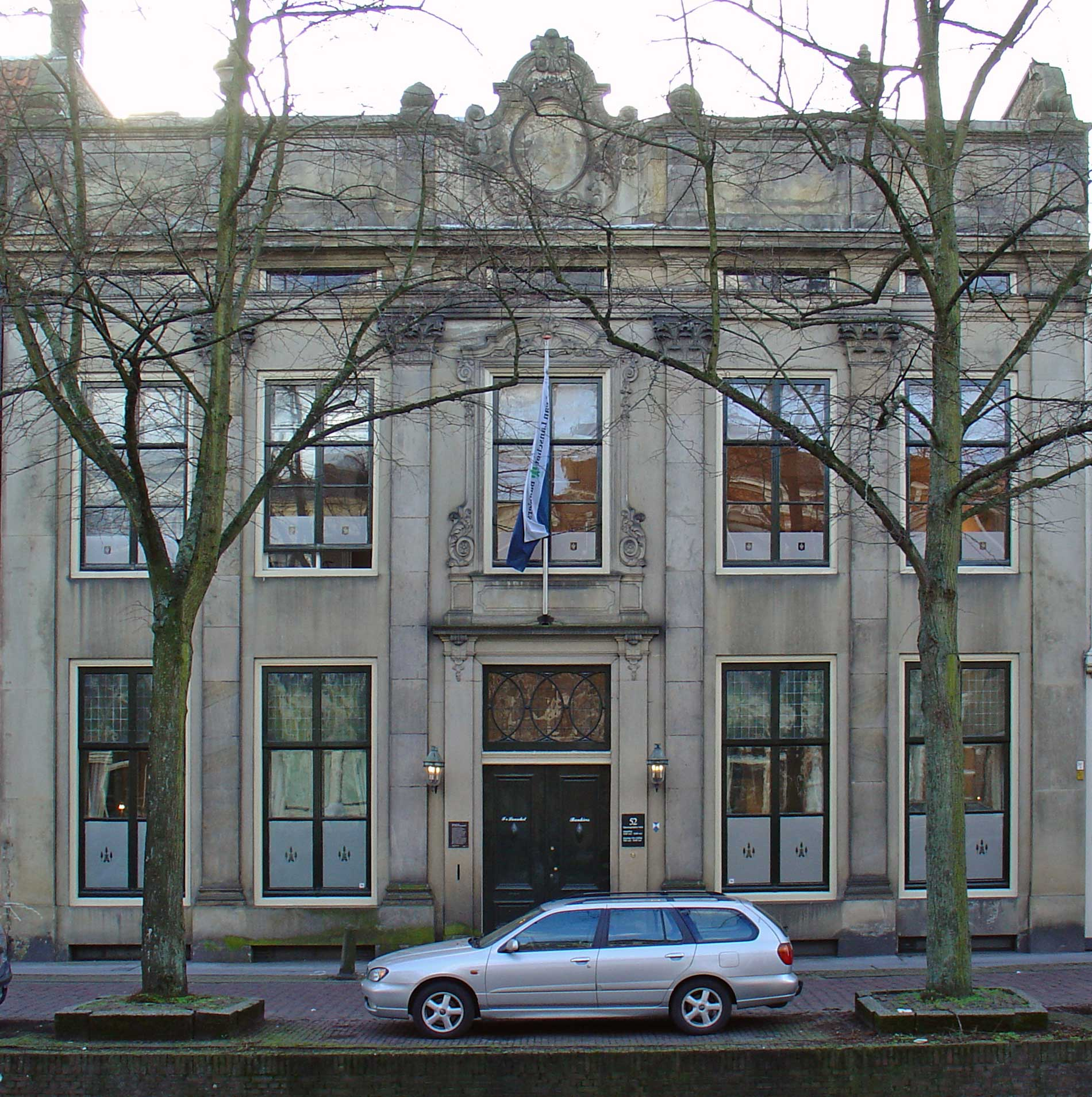 Westhaven 52 te Gouda o.a. woning van de Lange van Wijngaerden, later gymnasium